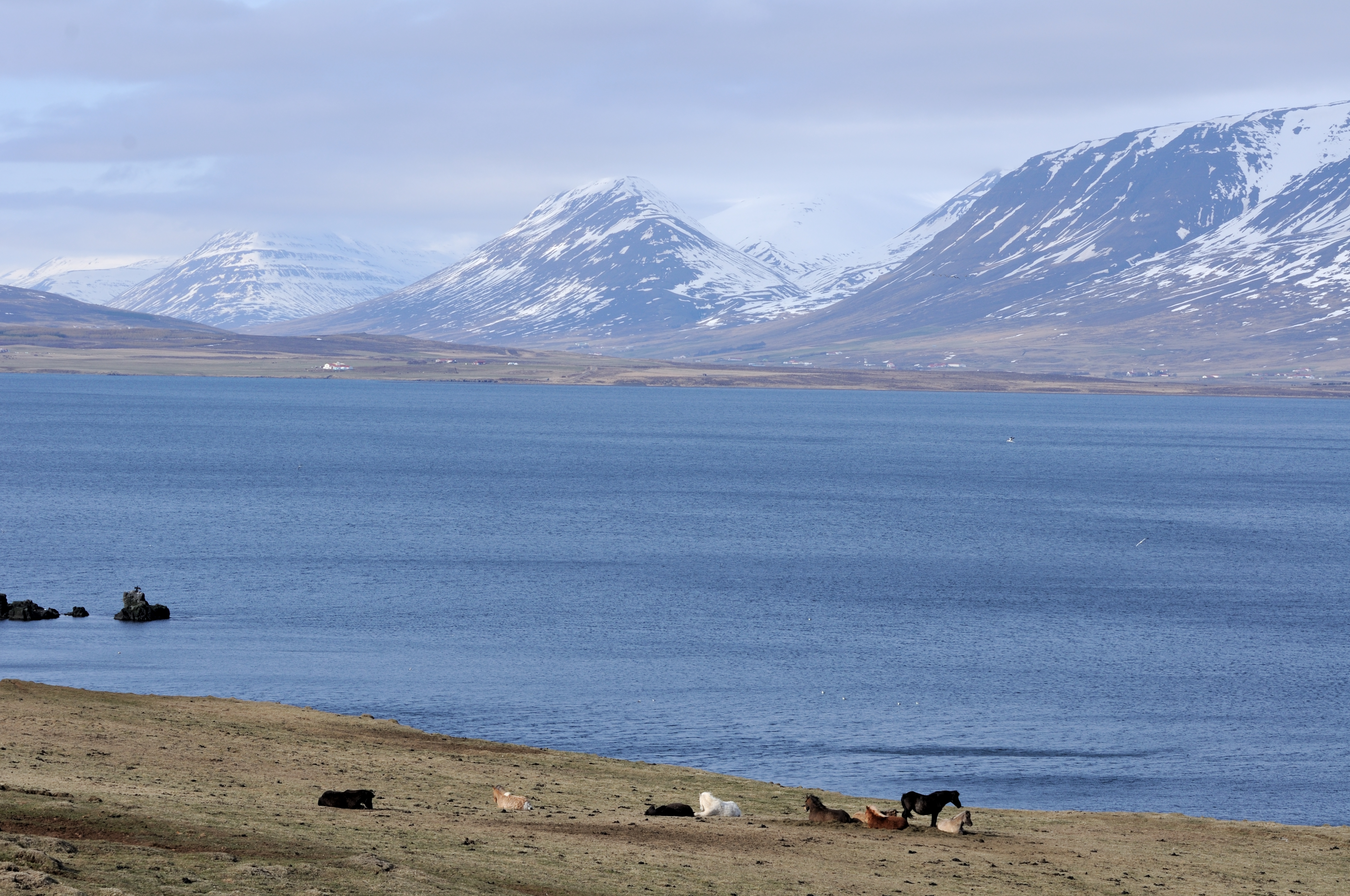 Iceland, Eyjafjörður from road 83